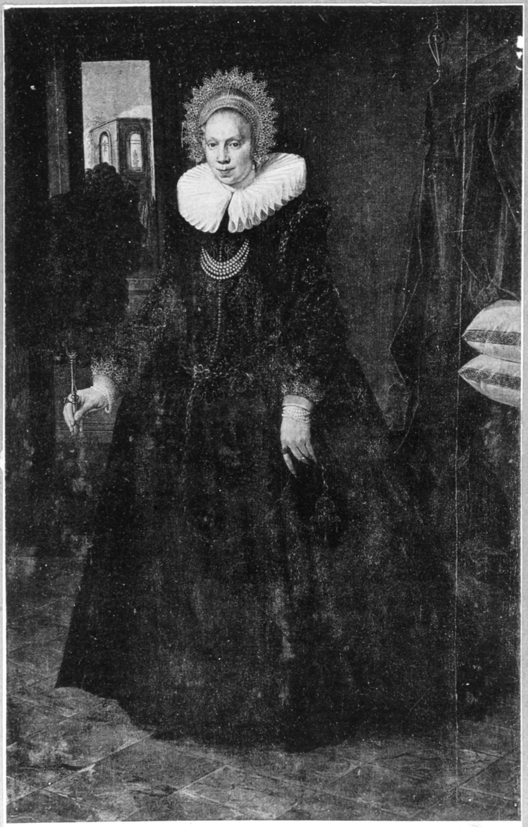 Geertruid Overlander (1577-1653), Ehefrau des Pieter Jansz Hooft